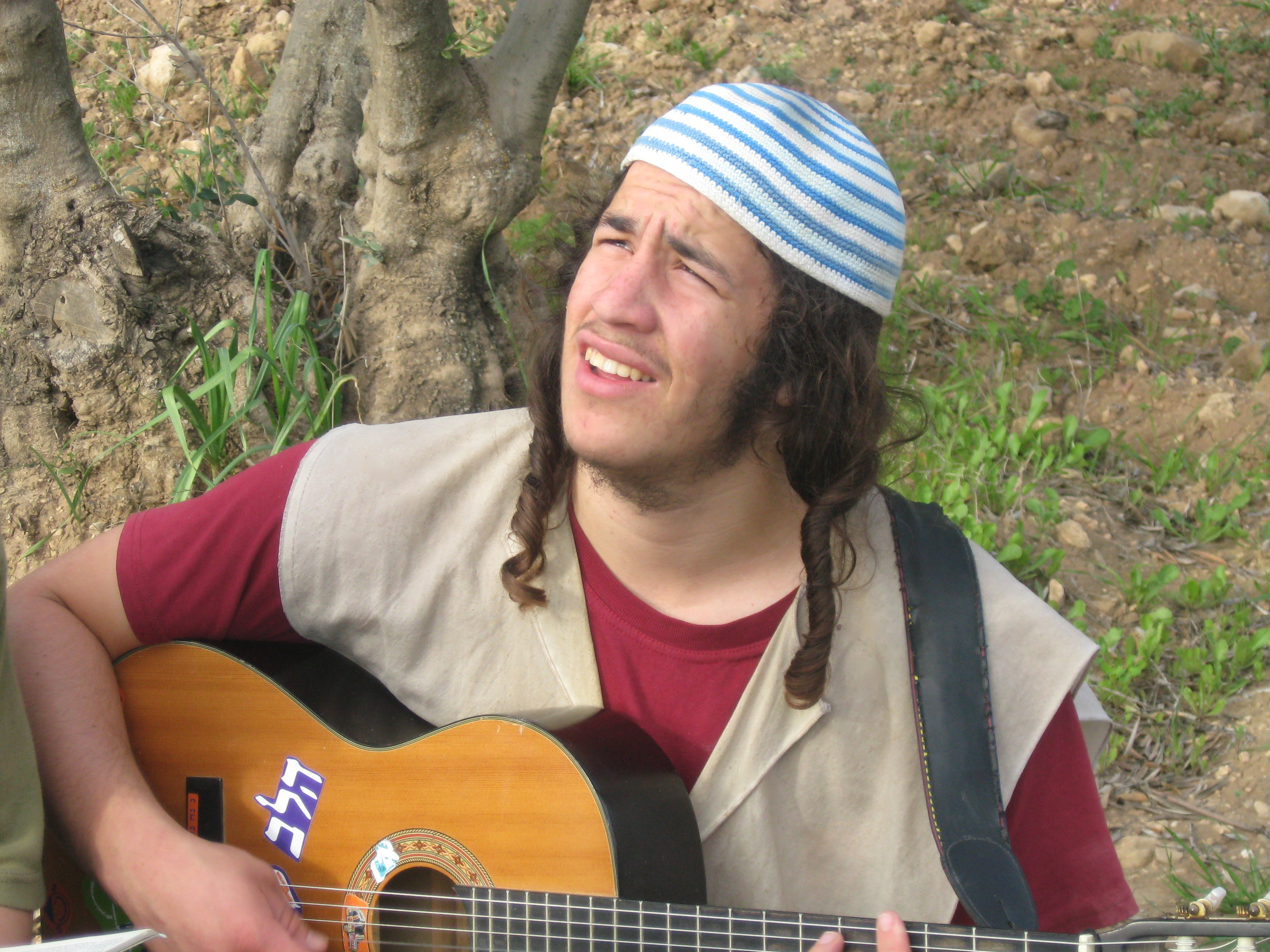 נער גבעות מנגן בגיטרה ליד רבוד